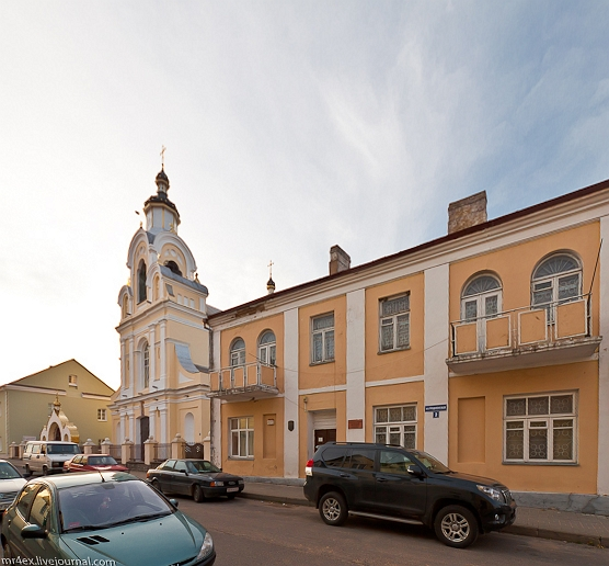 Музей і царква